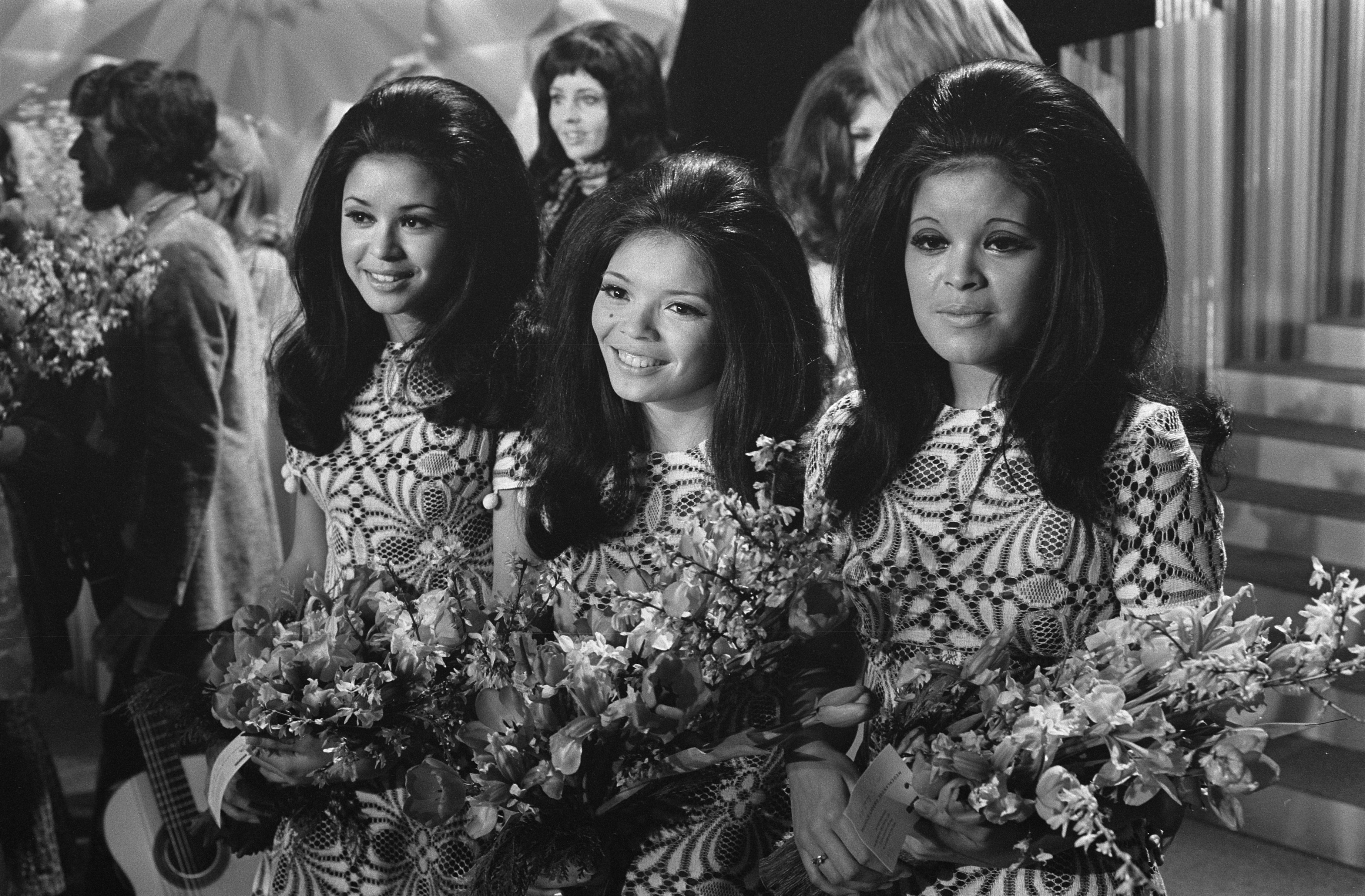 Collectie / Archief : Fotocollectie Anefo Reportage / Serie : [ onbekend ] Beschrijving : The Hearts of Soul , winnaars op Nederlandse finale Eurovisie Songfestival in Den Haag . The Hearts of Soul Datum : 11 februari 1970 Locatie : Den Haag, Zuid-Holland Trefwoorden : popmuziek, songfestivals, zangers Instellingsnaam : Eurovisie Song Festival Fotograaf : Verhoeff, Bert / Anefo Auteursrechthebbende : Nationaal Archief Materiaalsoort : Negatief (zwart/wit) Nummer archiefinventaris : bekijk toegang 2.24.01.05 Bestanddeelnummer : 923-2495